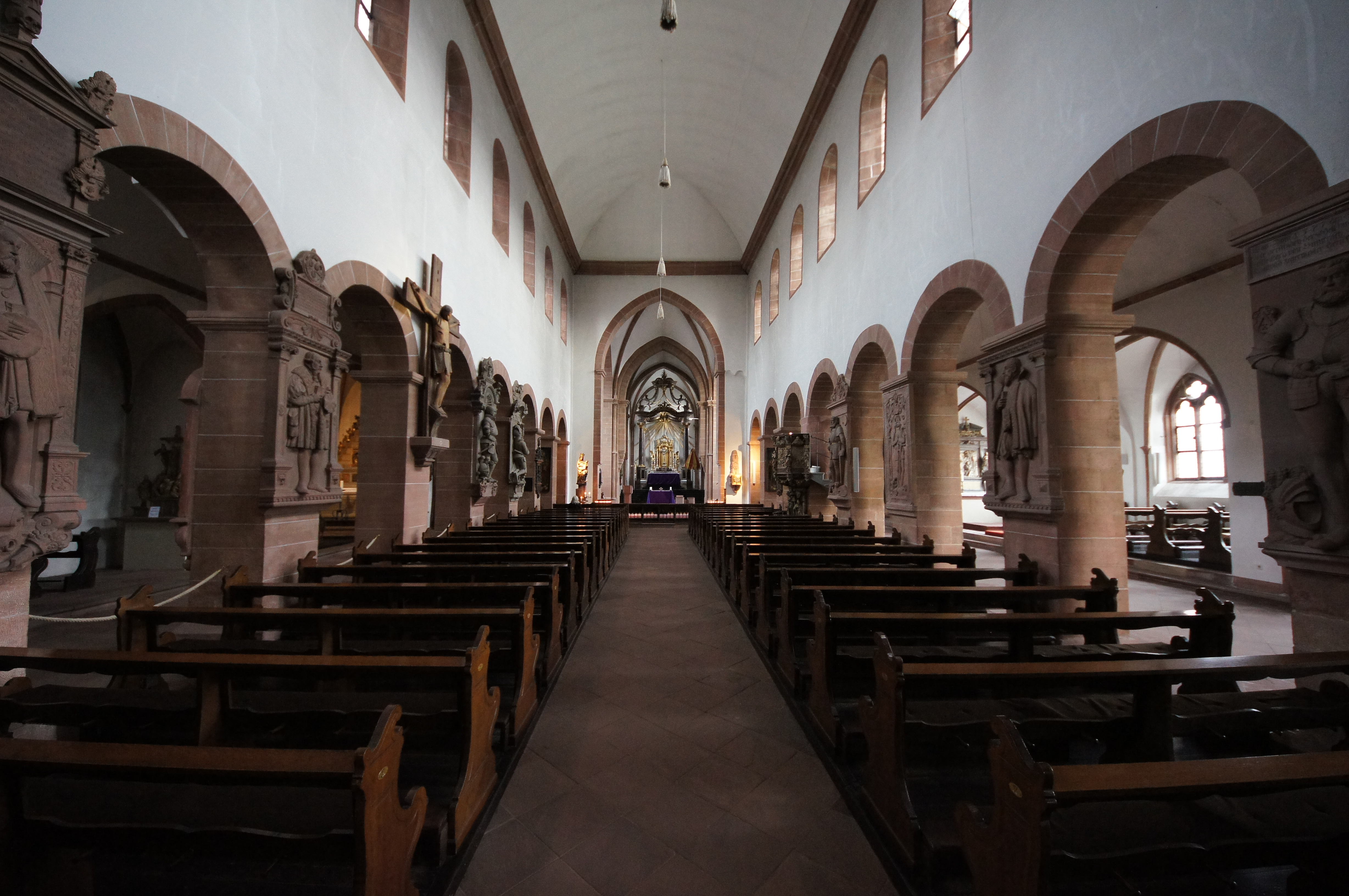 2011-03-26 Aschaffenburg 082 Stiftskirche St. Peter und Alexander.jpg